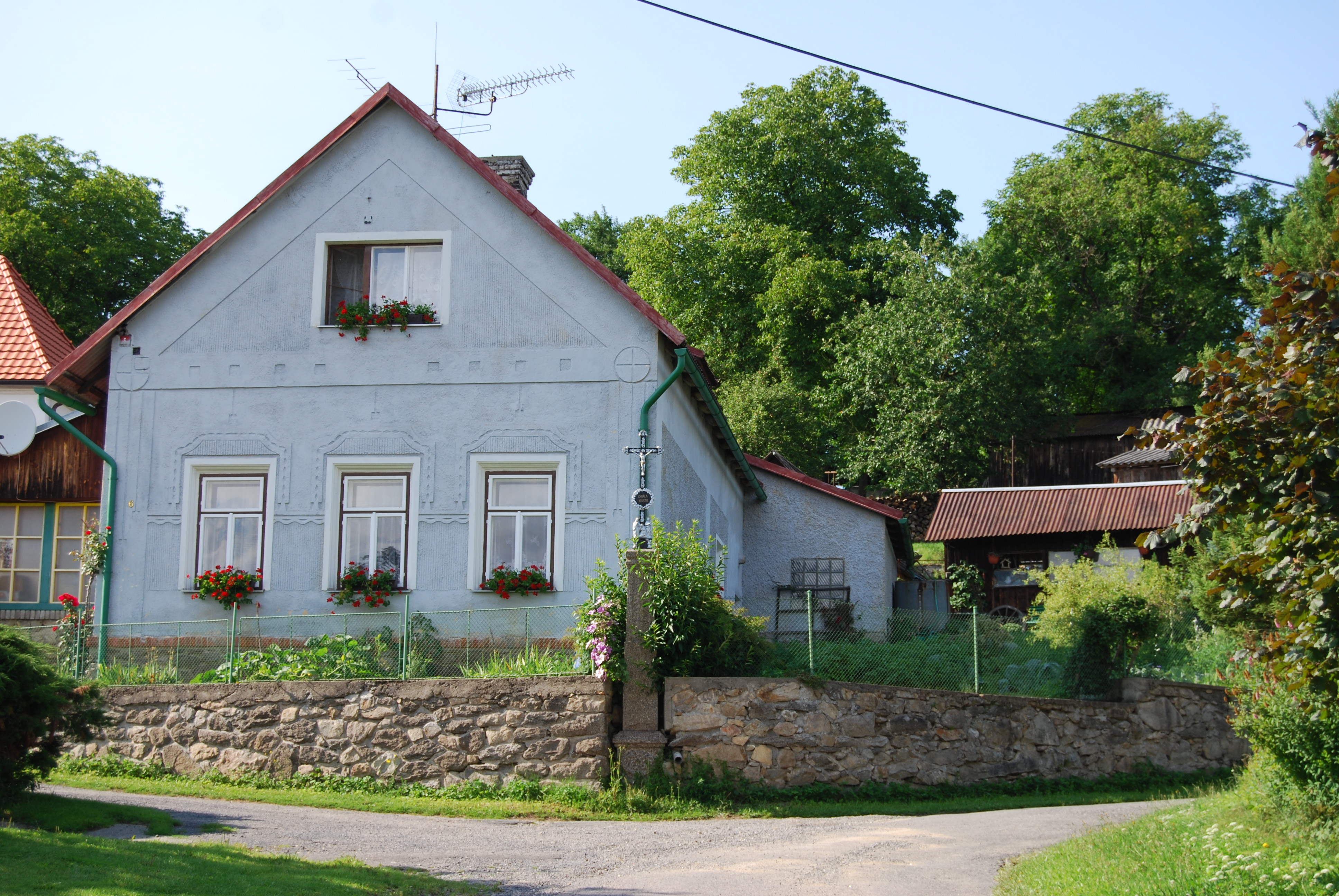 Kříž v terase u usedlosti v obci. Hronova Vesec je část obce Nadějkov v okrese Tábor. Ćeská republika.